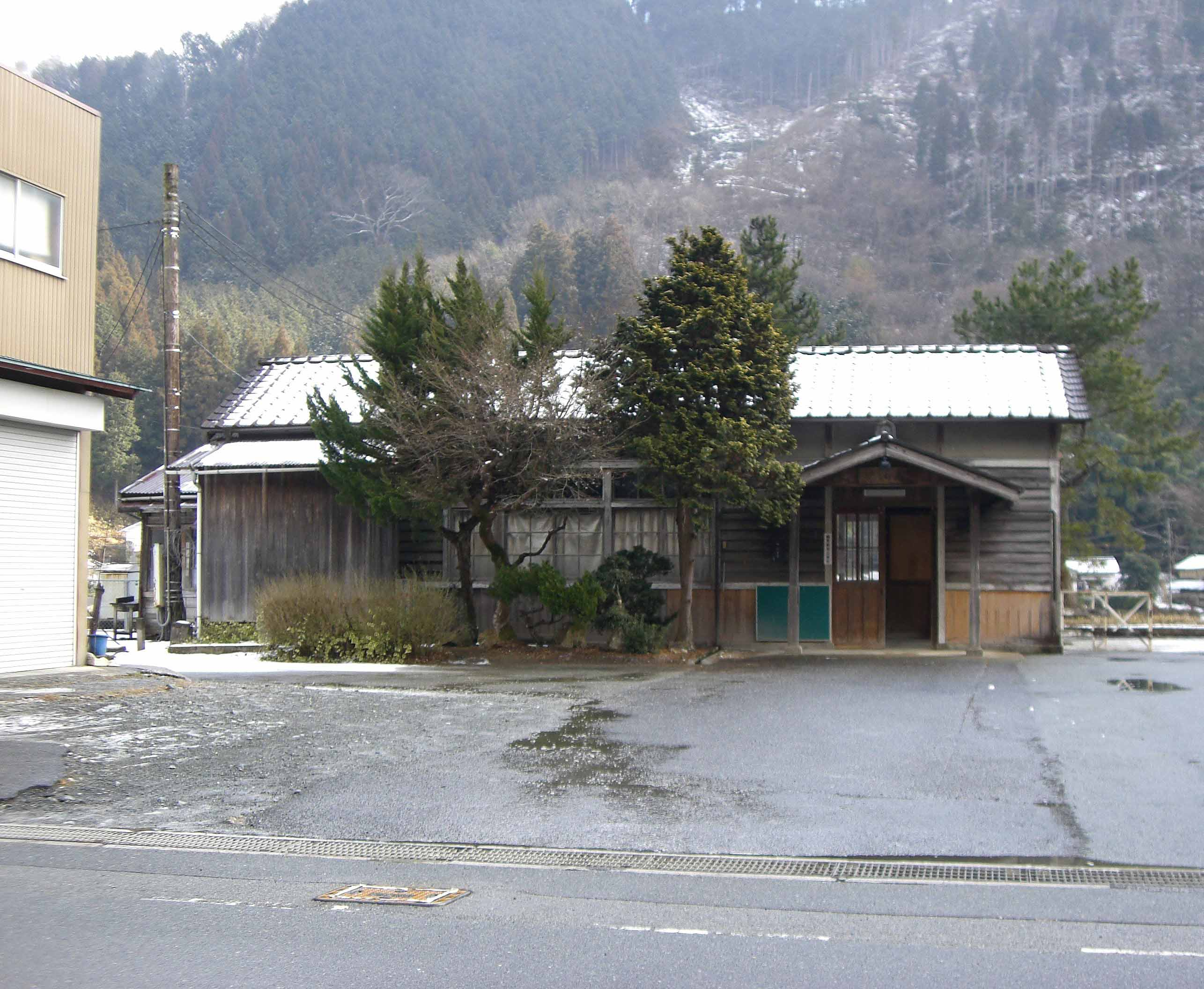 西日本旅客鉄道（JR西日本）姫新線岩山駅の駅舎